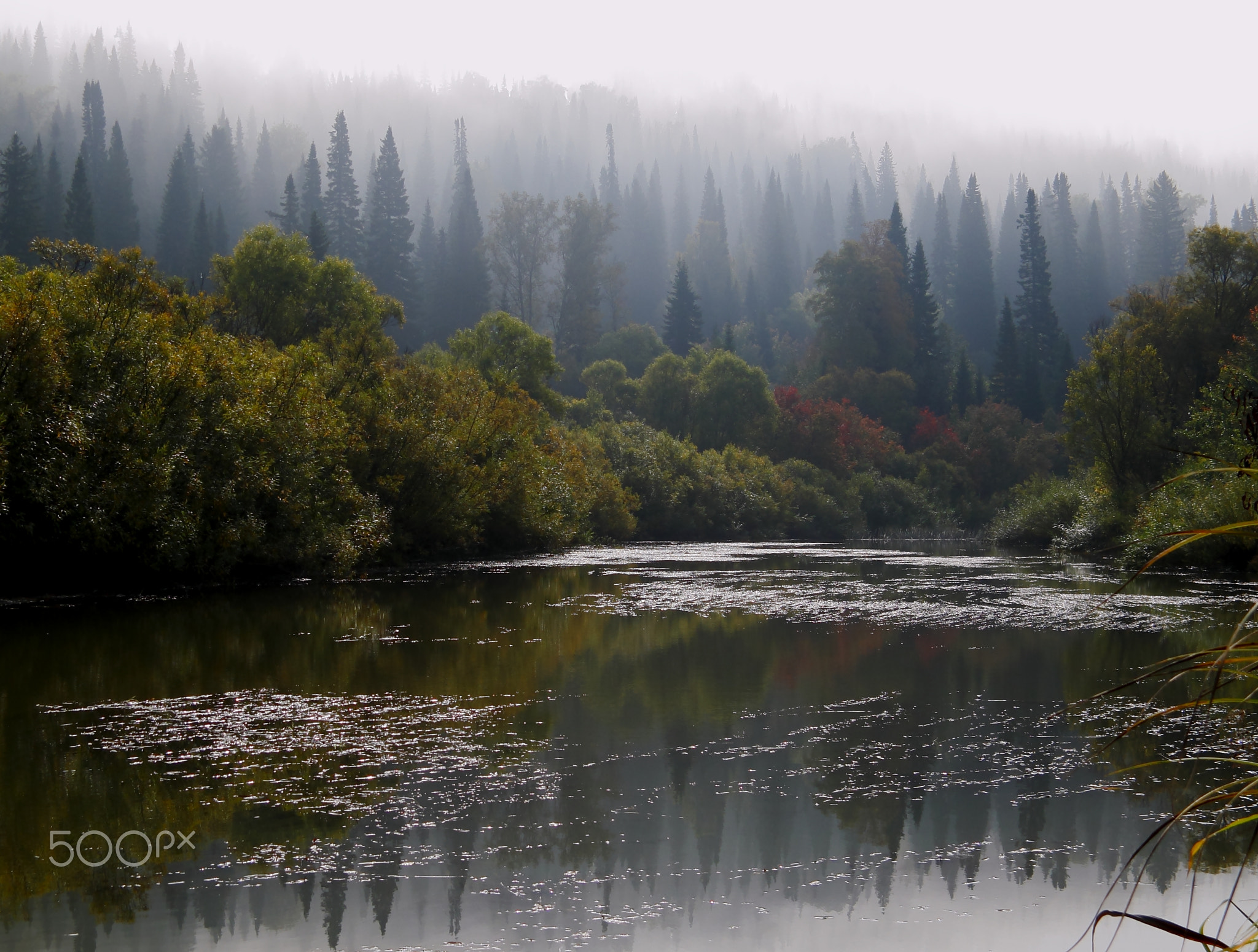 500px provided description: ? ? ??? ?? ??????? ?????: ?. ????? ??????: ?. ????? ?????????, ??? ???????, ????? ???????, ?? ????? ?? ? ??????????? ?????: ? ??????? ?? ???????, ?? ???????, ? ? ????? ??? ?? ?????????? ?????. ??????: ???? ??????? ??????, ???? ???? ?? ????????, ??????? ?? ?????, ?? ?????... ? ? ???, ? ? ??? ?? ???????, ?? ??????? ? ?? ??????? ?????. ?????????, ??? ??????, ????? ?????? ??? ????, ??? ???? ??????? ??????. ?? ?????????, ??? ??? ?????, ????? ?????: ????, ??????, ?????, ????? ? ?????. ??????: ? ????? ??????-????? ?????? ??? ? ?????? ????????: ??????, ??????, ?????????????? ?????... ? ? ???, ? ? ??? ?? ???????, ?? ??????? ? ?? ??????? ?????. ? ? ???, ? ? ??? ?? ???????, ?? ??????? ? ?? ??????? ??? [#?????? ???? ??????? ???? ????? ????? ?????? ????????? ??????]